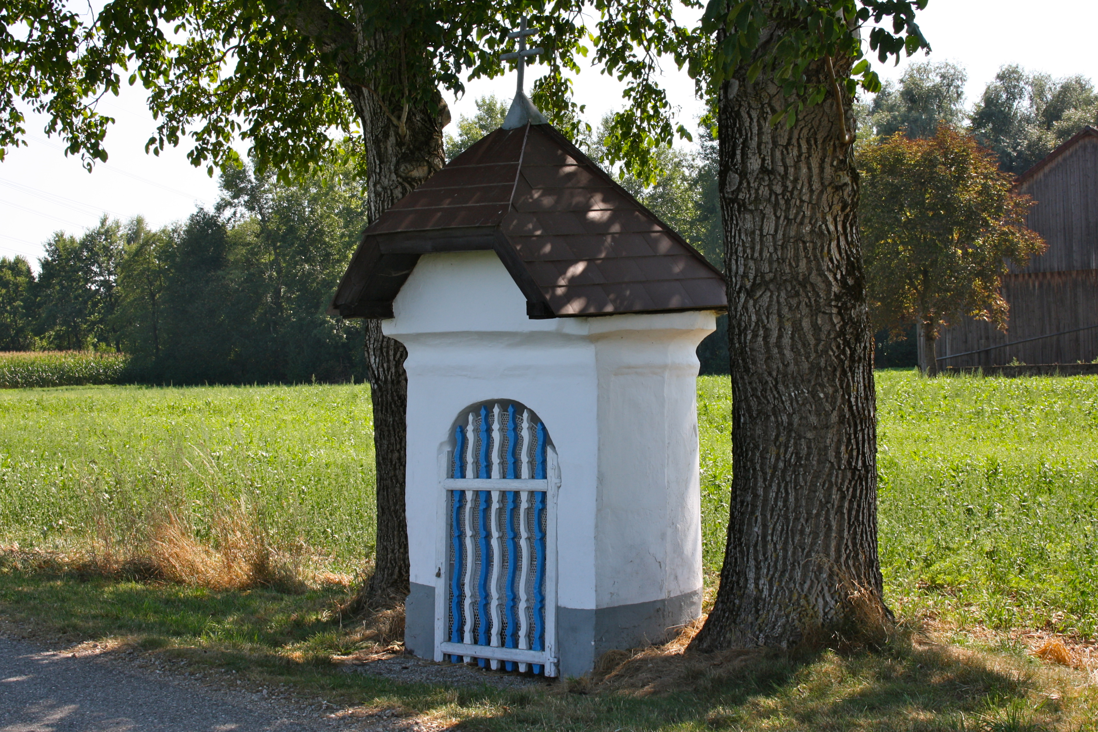 Englmüllerkapelle in Burgkirchen (Oberösterreich).